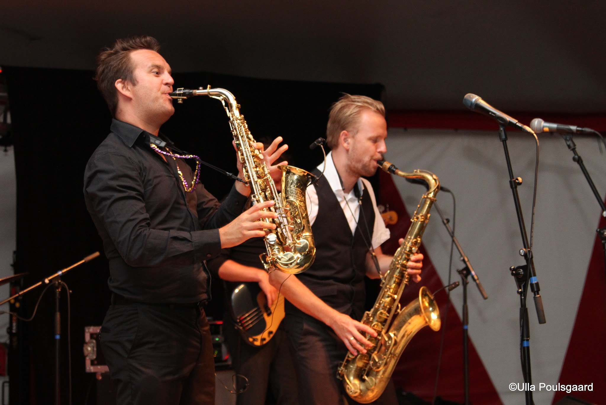 Jazz Five har flere gange besøgt Ringkøbing Fjord Jazz Festival